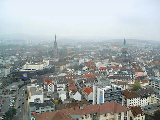 Larger image of Kaiserslautern